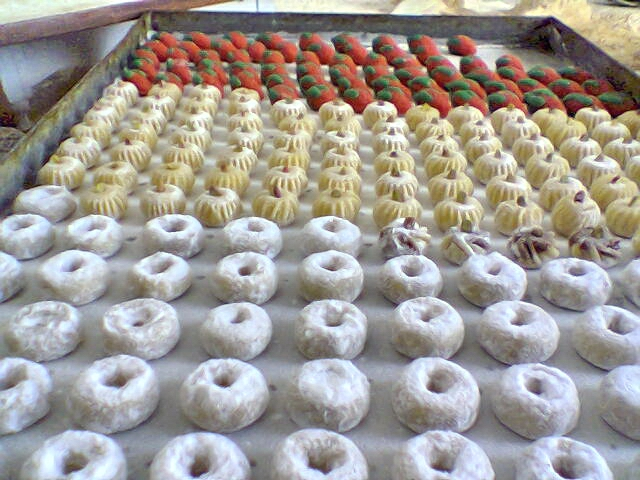 Tunisian sweets